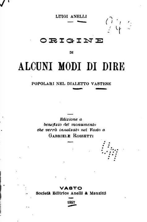 Frontespizio di un libro digitalizzato su [|url= Internet Archive] e da me ricavato: Luigi Anelli,Origine di alcuni modi di dire popolari nel dialetto vastese,Società editrice Anelli & Manzitti, Vasto 1890 circa